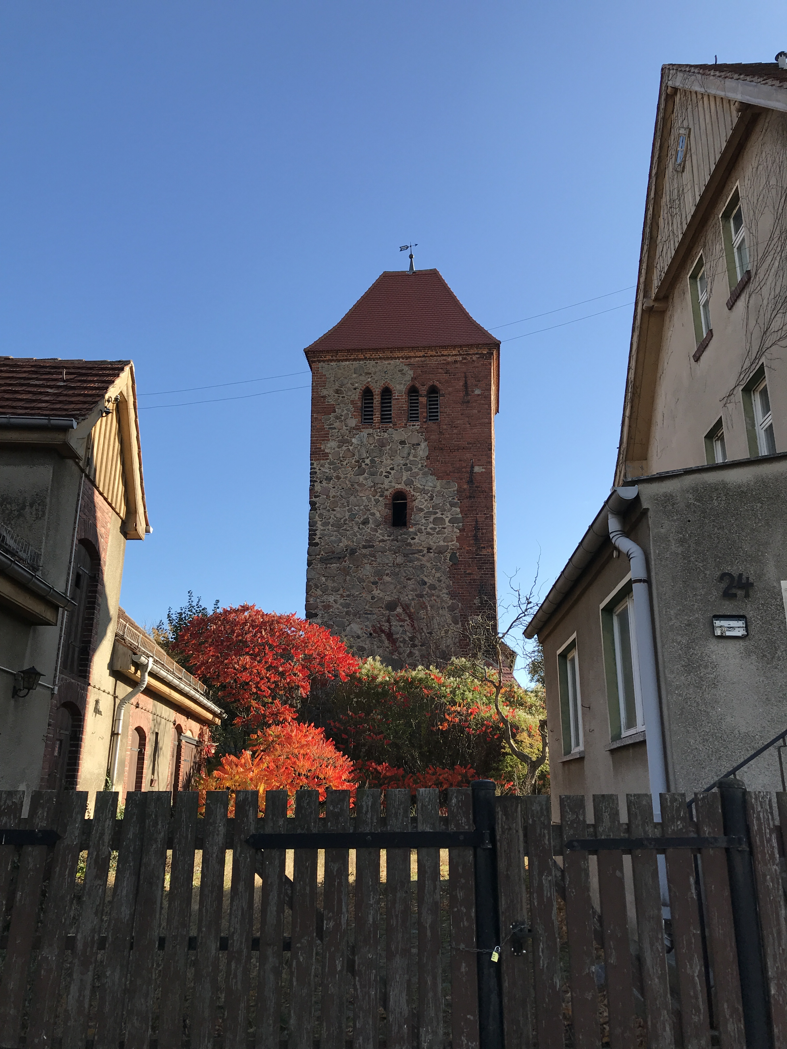 Die Dorfkirche Hohenseefeld in der Gemeinde Niederer Fläming im Landkreis Teltow-Fläming ist eine Feldsteinkirche aus dem 13. Jahrhundert. Im Innern steht unter anderem ein hölzerner Kanzelaltar, der Ende des 19. Jahrhunderts unter Verwendung historischer Teile entstand.